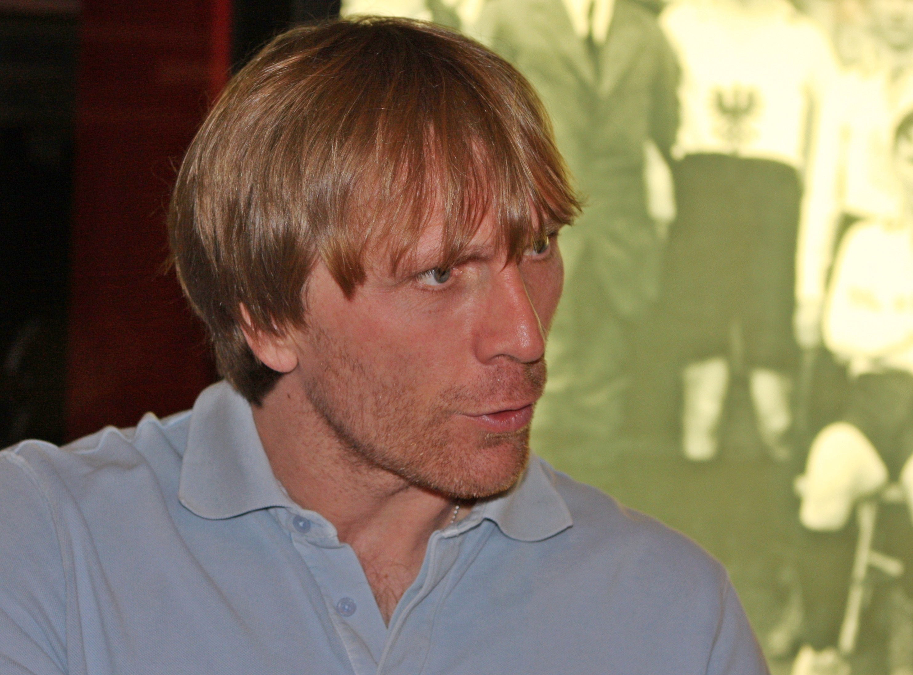 Ansgar Brinkmann nach einer Veranstaltung (Aufstieg 98) im Eintracht Frankfurt Museum 2008